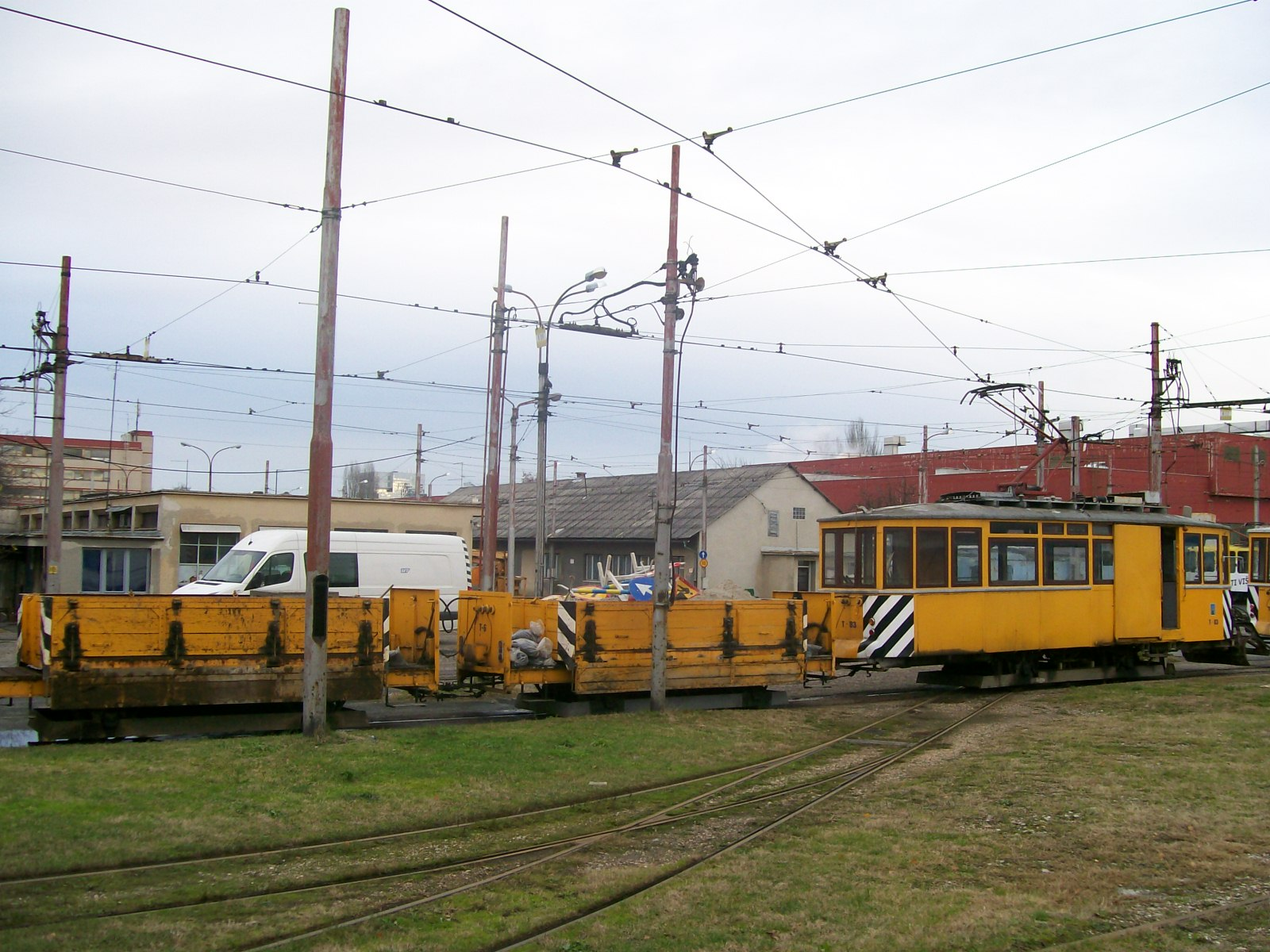 Teretni tramvaj T-83 u spremištu Trešnjevka, Zagreb